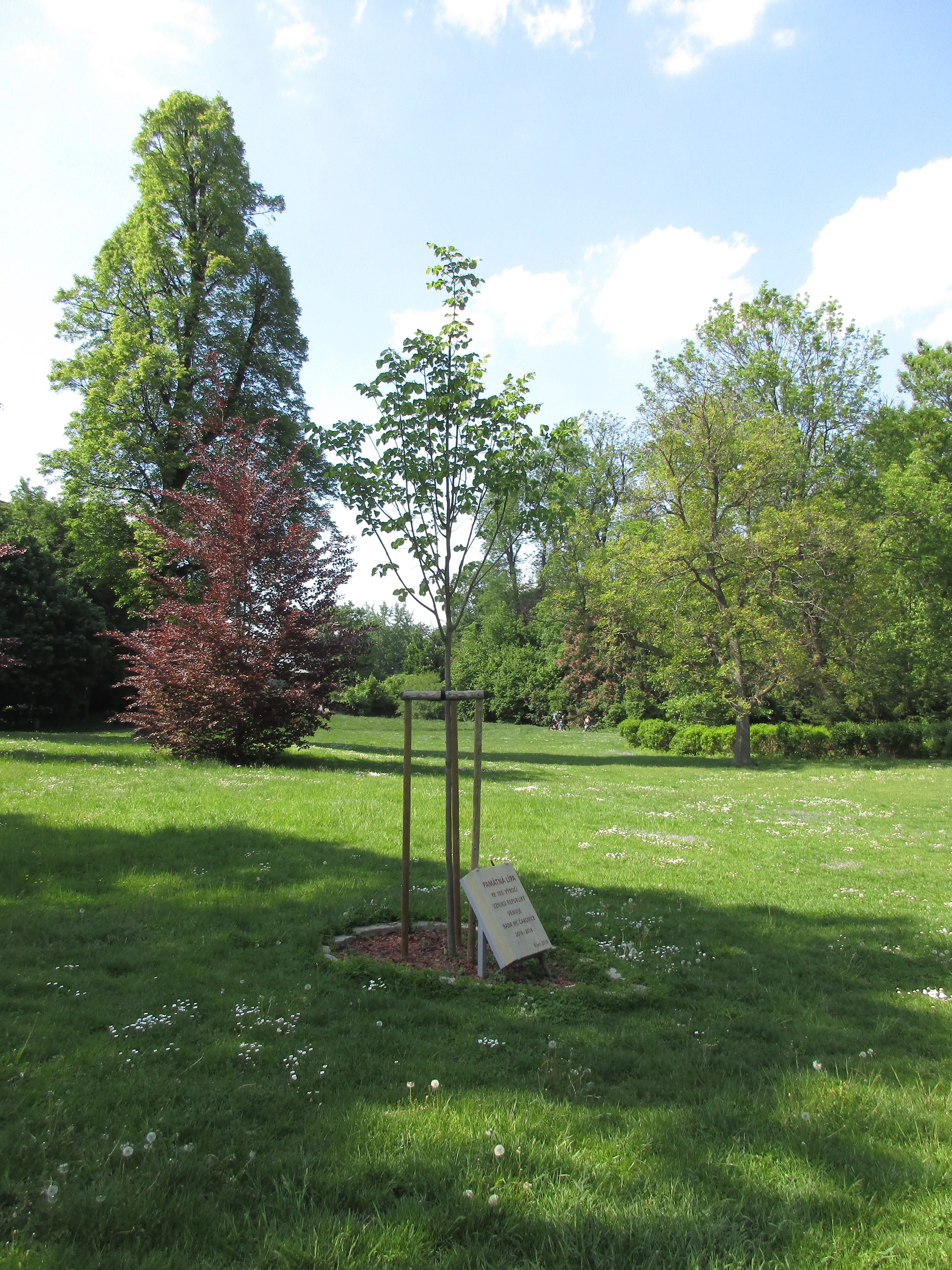 Lípa republiky. Praha 9 - Čakovice, zámecký park. Vysazena roku 2018 na památku 100. výročí vzniku Československé republiky.